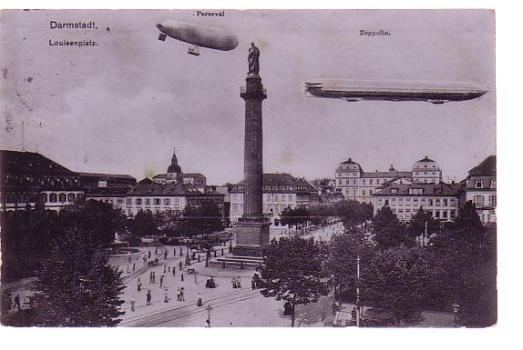 Ansicht des Luisenplatz auf einer Postkarte von 1909